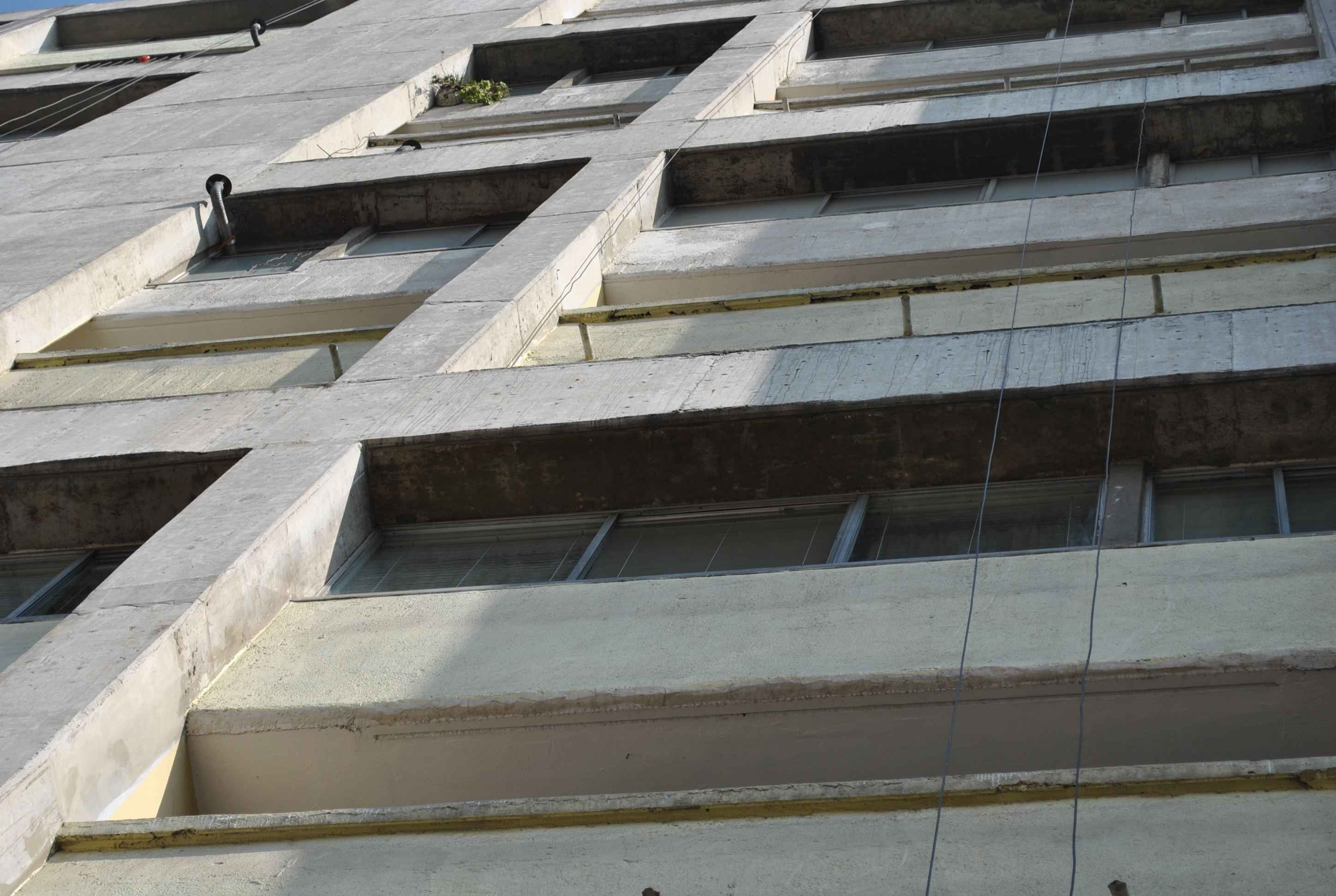 Detalle del edificio Chihuahua